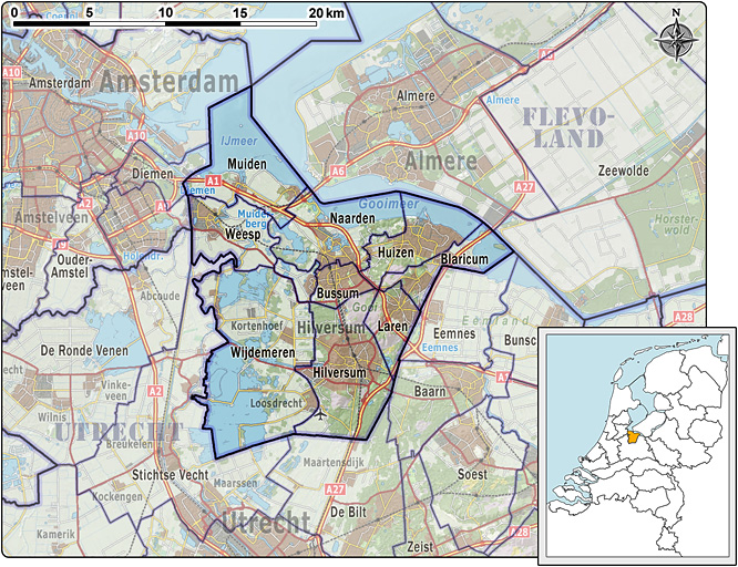 Kaart van Veiligheidsregio Gooi en Vechtstreek, met indeling van gemeenten (2012) en impressie van het landschap. Referentie-ondergrond (kustlijn, steden, wegen) gerasterd uit de OpenStreet Map OSM. Inhoud is beschikbaar onder de Creative Commons Attribution-ShareAlike 3.0 license. Referentie-ondergrond op water bewerkt vanuit Gebruik is vrij met bronvermelding NLR en ESA. Vectorgrenzen van gemeenten op basis van het vrij te gebruiken geo-bestand van het CBS. Hoogte-aanduidingen (reliëf) gerasterd uit de AHN Viewer ( gebruik is vrij met bronvermelding (c) AHN, Overige kenmerken op de kaart: eigen tekenwerk.